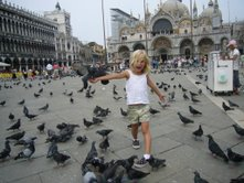 Bambina_a_piazza_san_marco_con_colombe